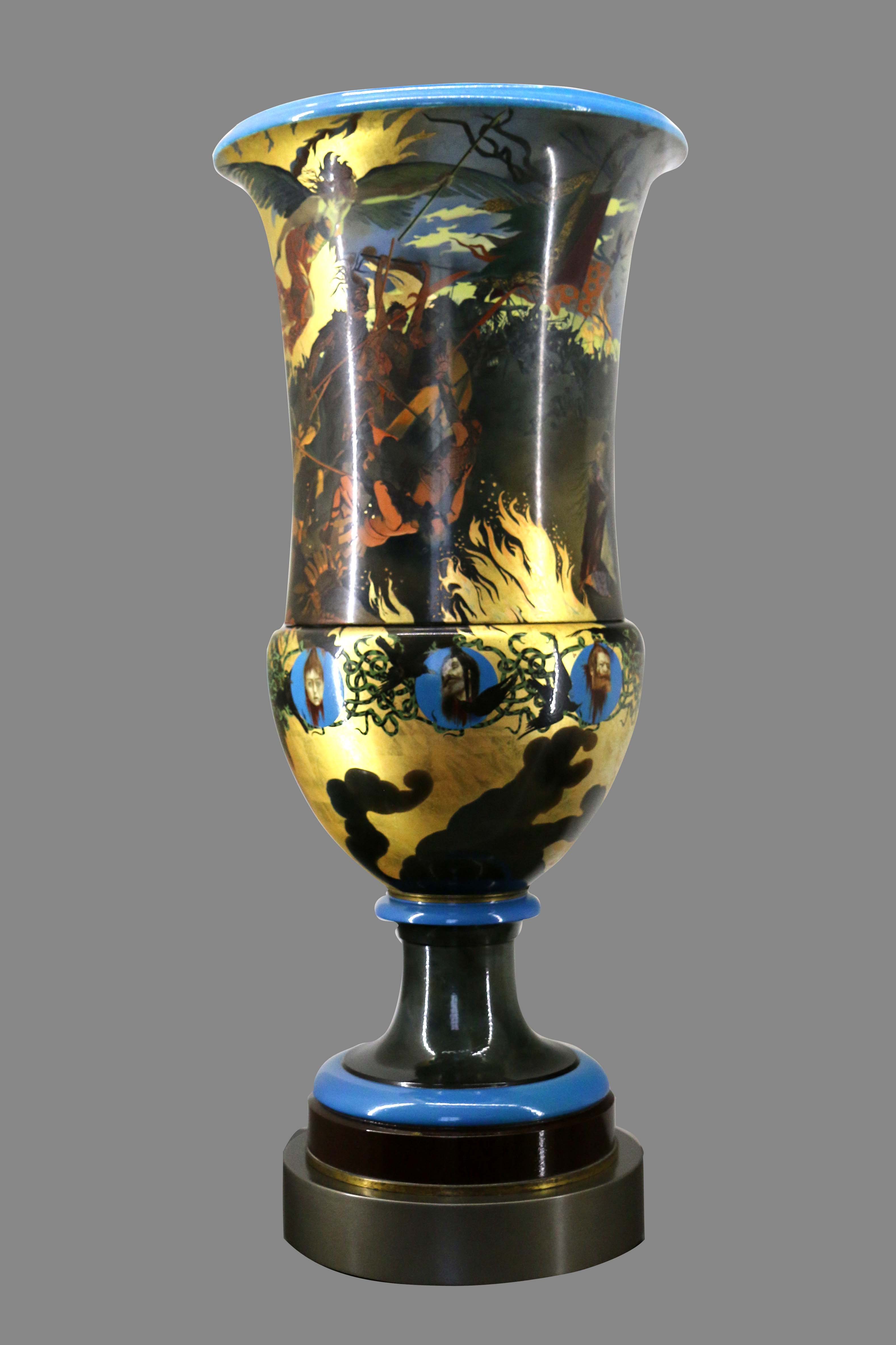 Vase en porcelaine de 1895 décoré par Georges-Antoine Rochegrosse au musée des Arts décoratifs de la Faïence et de la Mode au château Borély à Marseille.